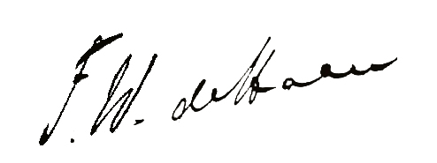 Frans de Haan signature.